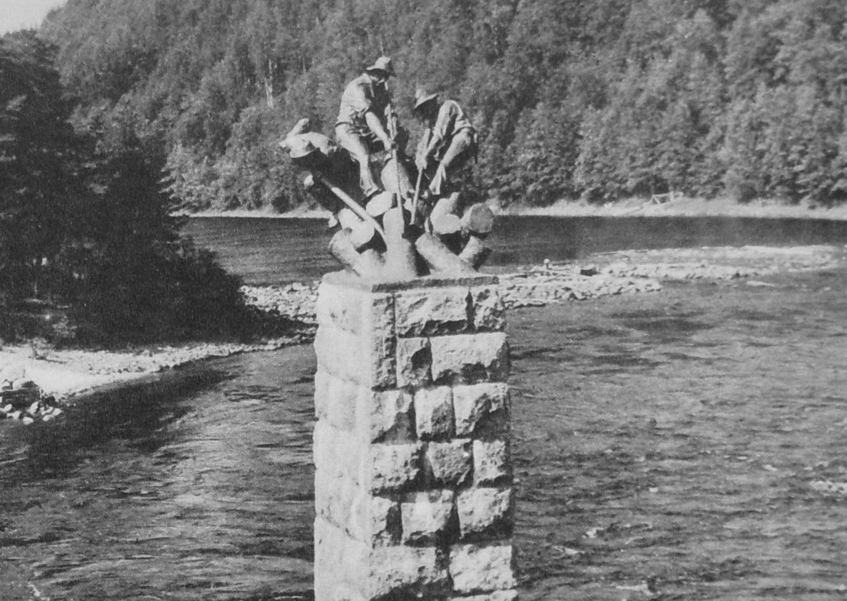 Fredrik Frisendahls största verk skulpturgruppen “Timmerflottare” (1939). Gruppen står på en hög pelare mitt i Ångermanälvens fors i Sollefteå.